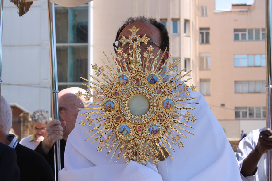 Procesión de la Custodia en día de Corpus Christi en el Santuario de San José de la Montaña.